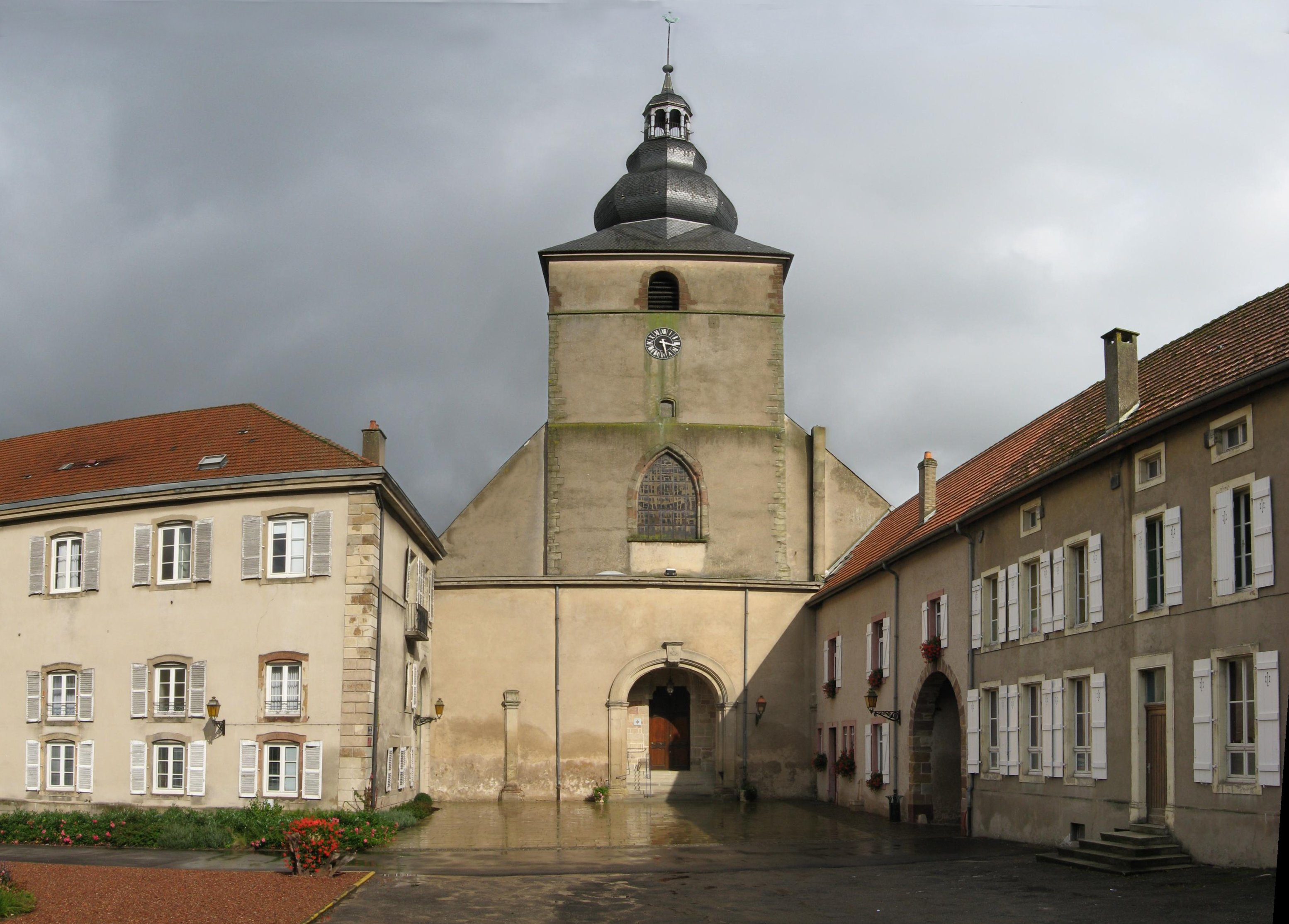 Kirche in Bouzonvill